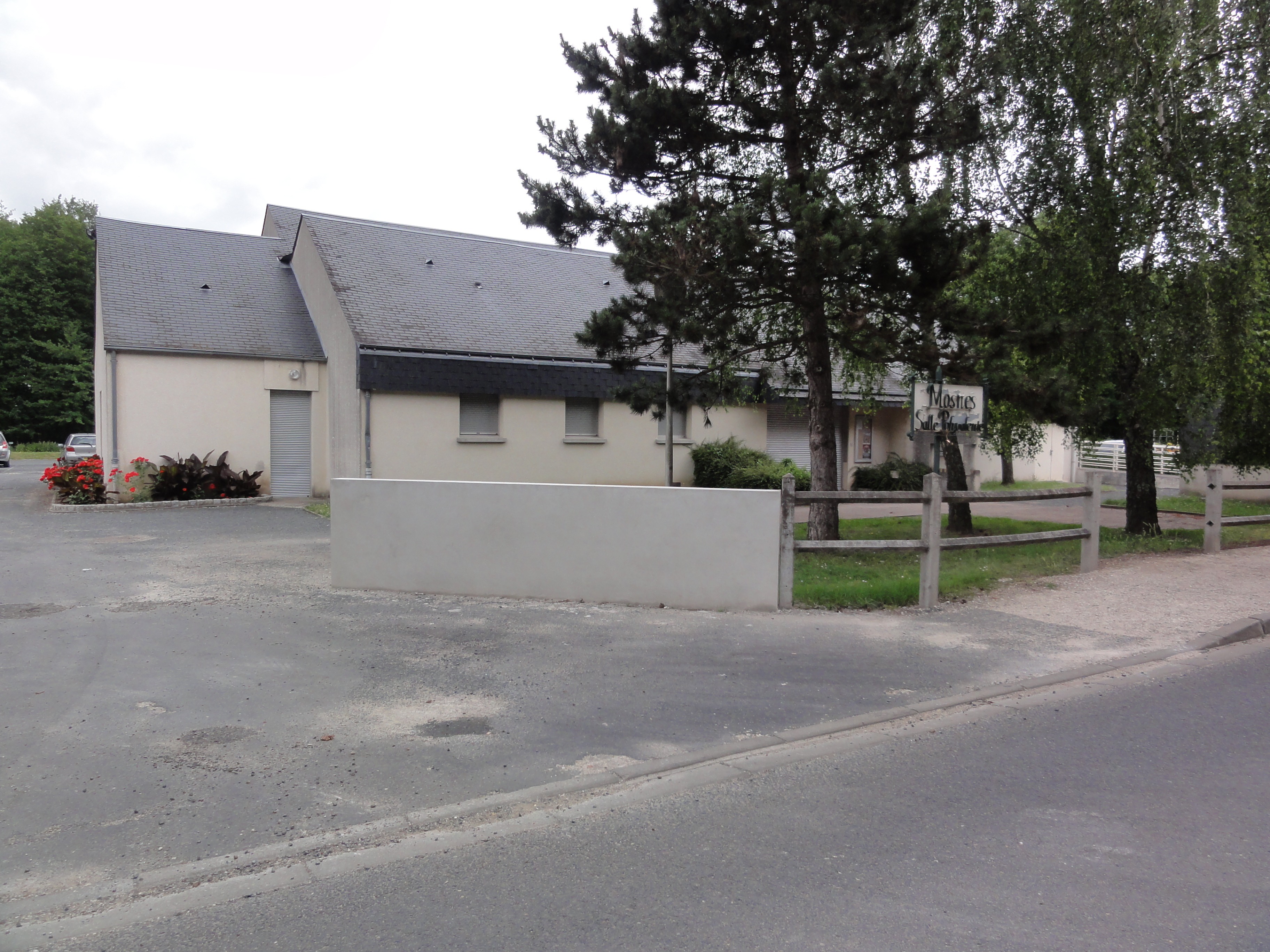 Mosnes (Indre-et-Loire) salle polyvalente